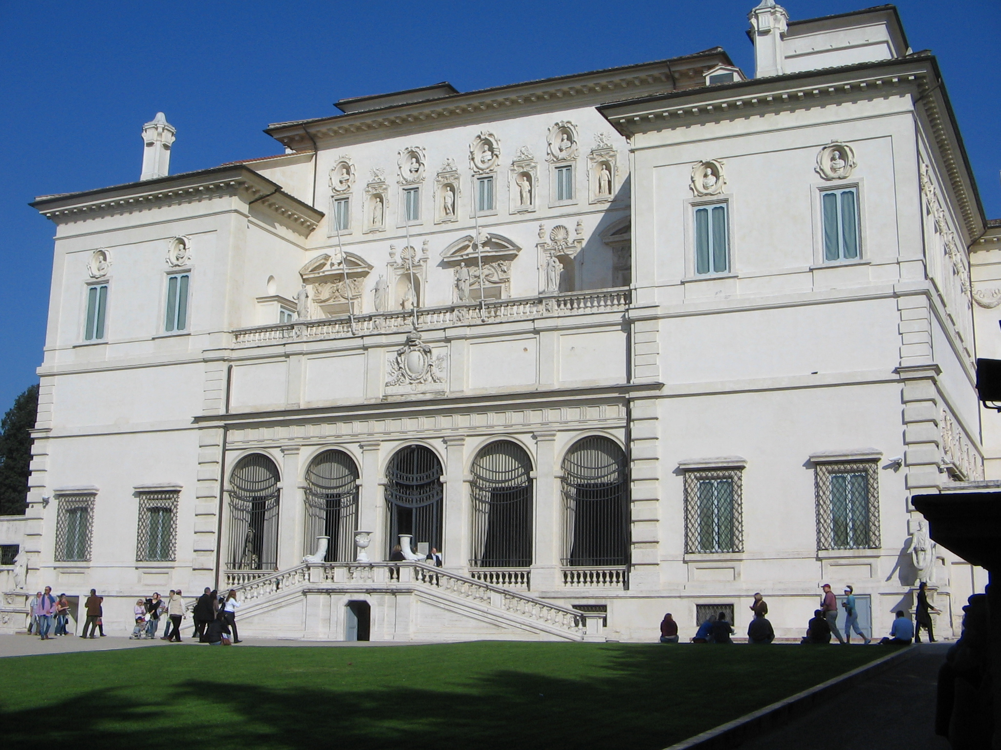 Museo e Galleria Borghese Roma